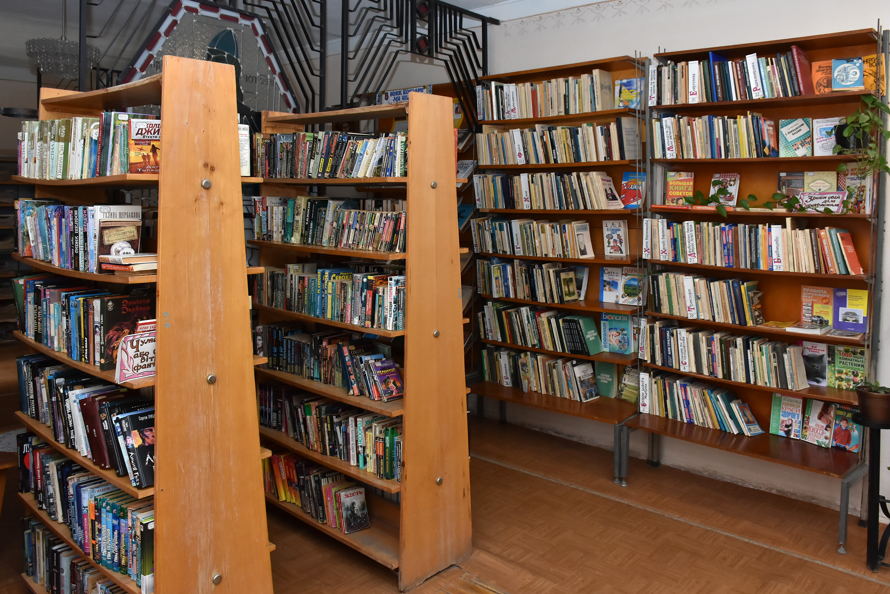 Бібліотека № 8 для дорослих Тернопільської міської централізованої бібліотечної системи.